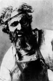 Шаляпин в образе Еремки в опере Серова "Вражья сила"